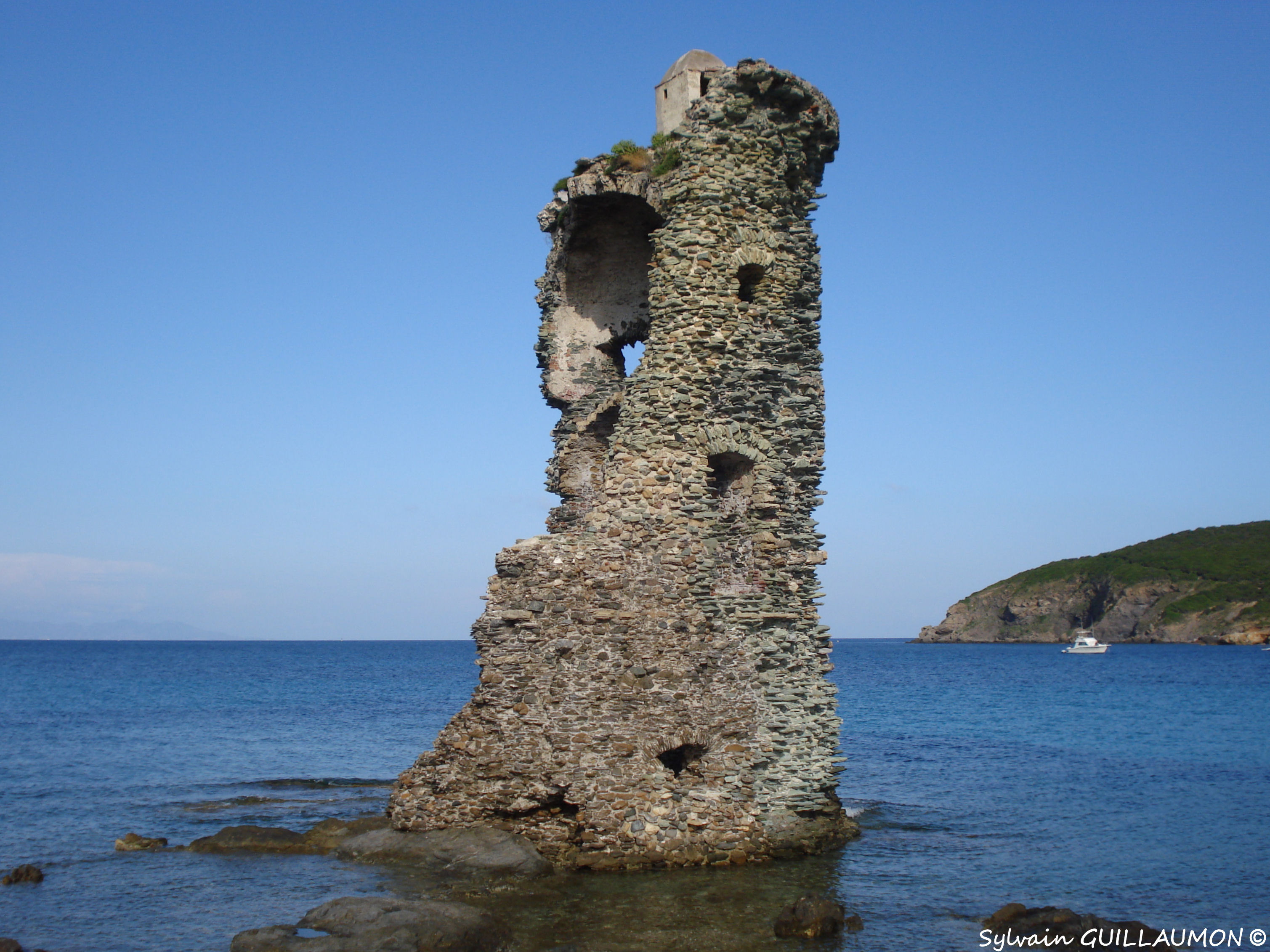 Vue sur la Tour Santa Maria (achevée en 1549, partiellement détruite en 1793, inscrite aux Monuments Historiques), au loin l'Ile de Capraia, depuis le Sentier des Douaniers (1)